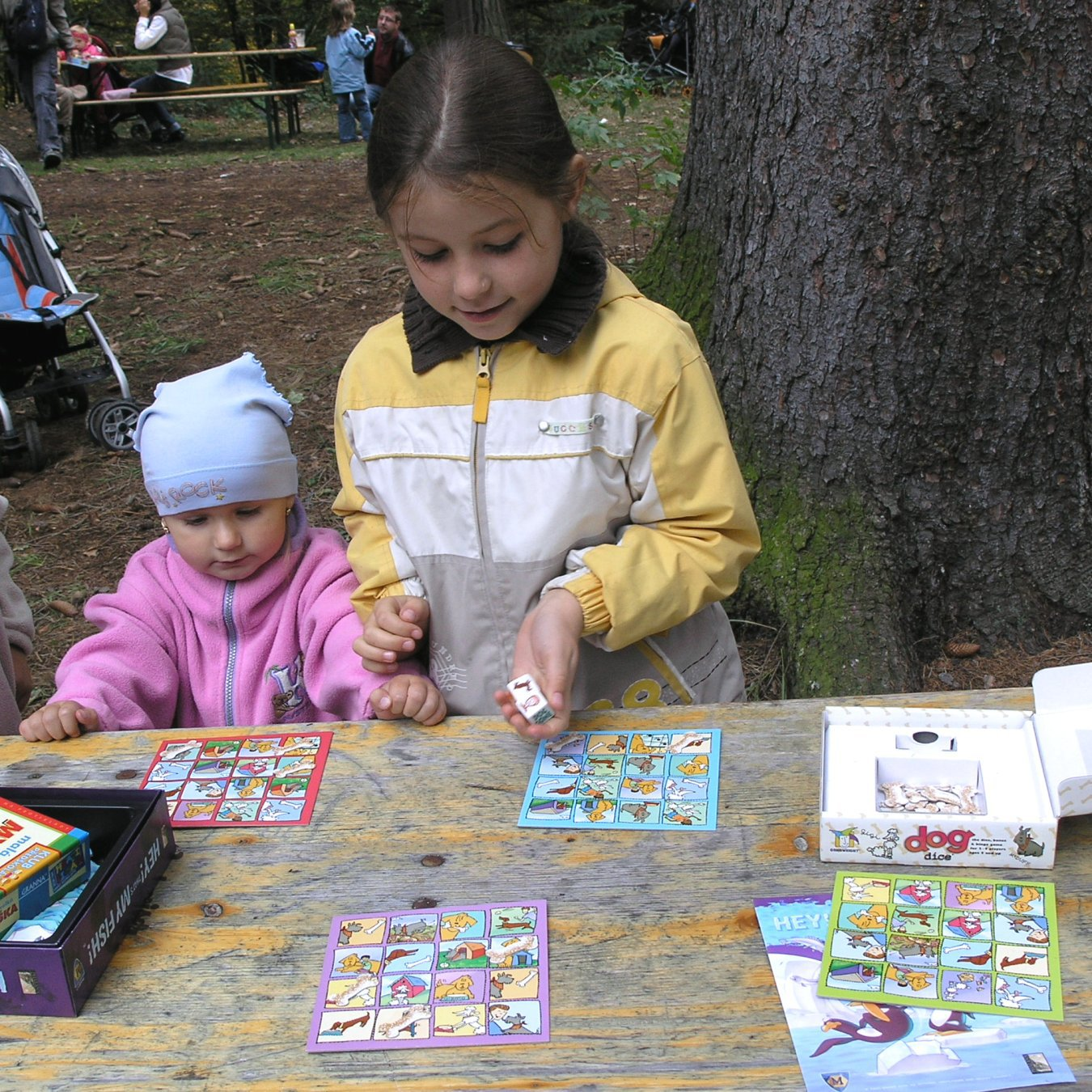 Dog Dice